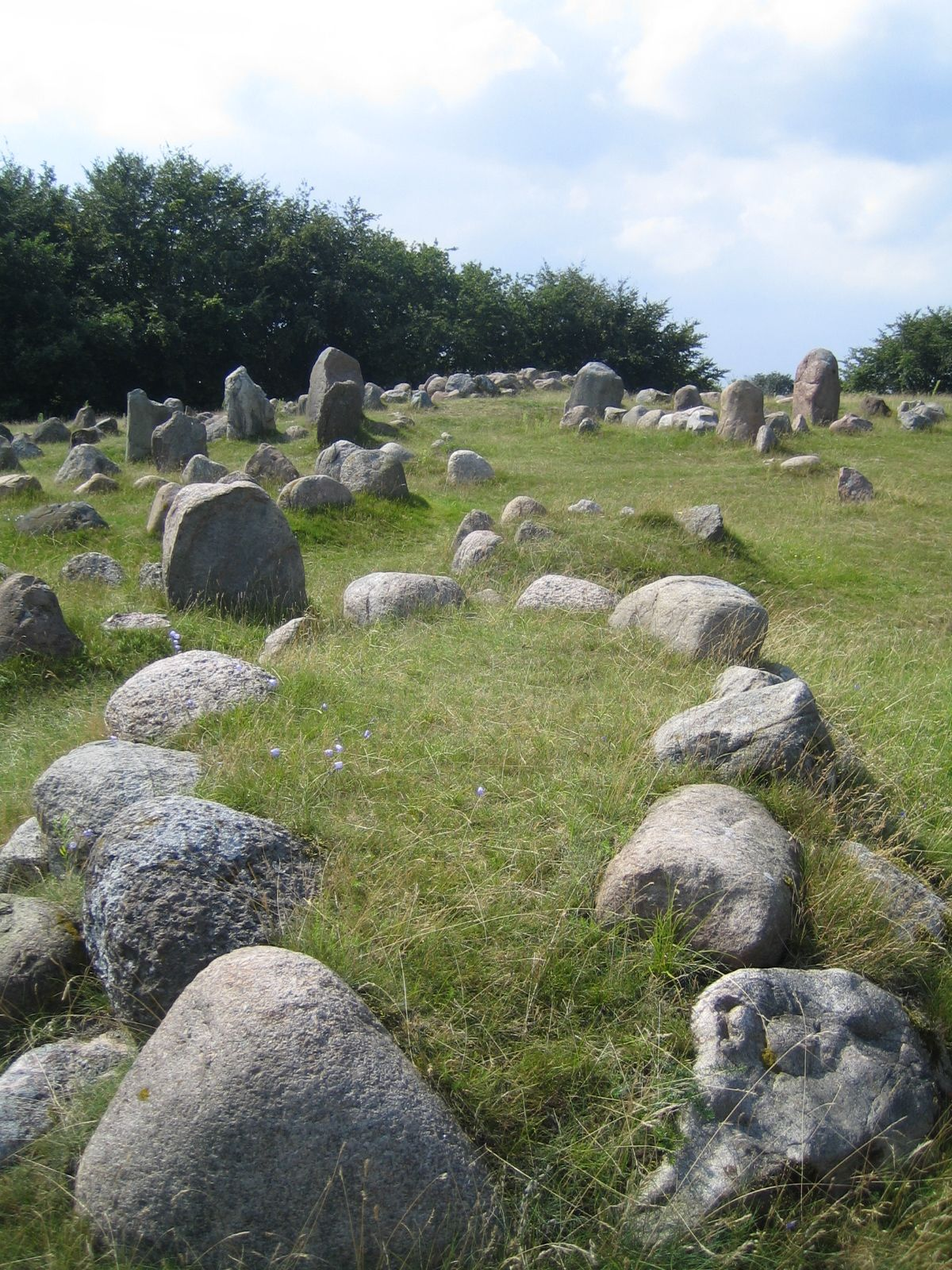 Lindholm Høje (Danmark)